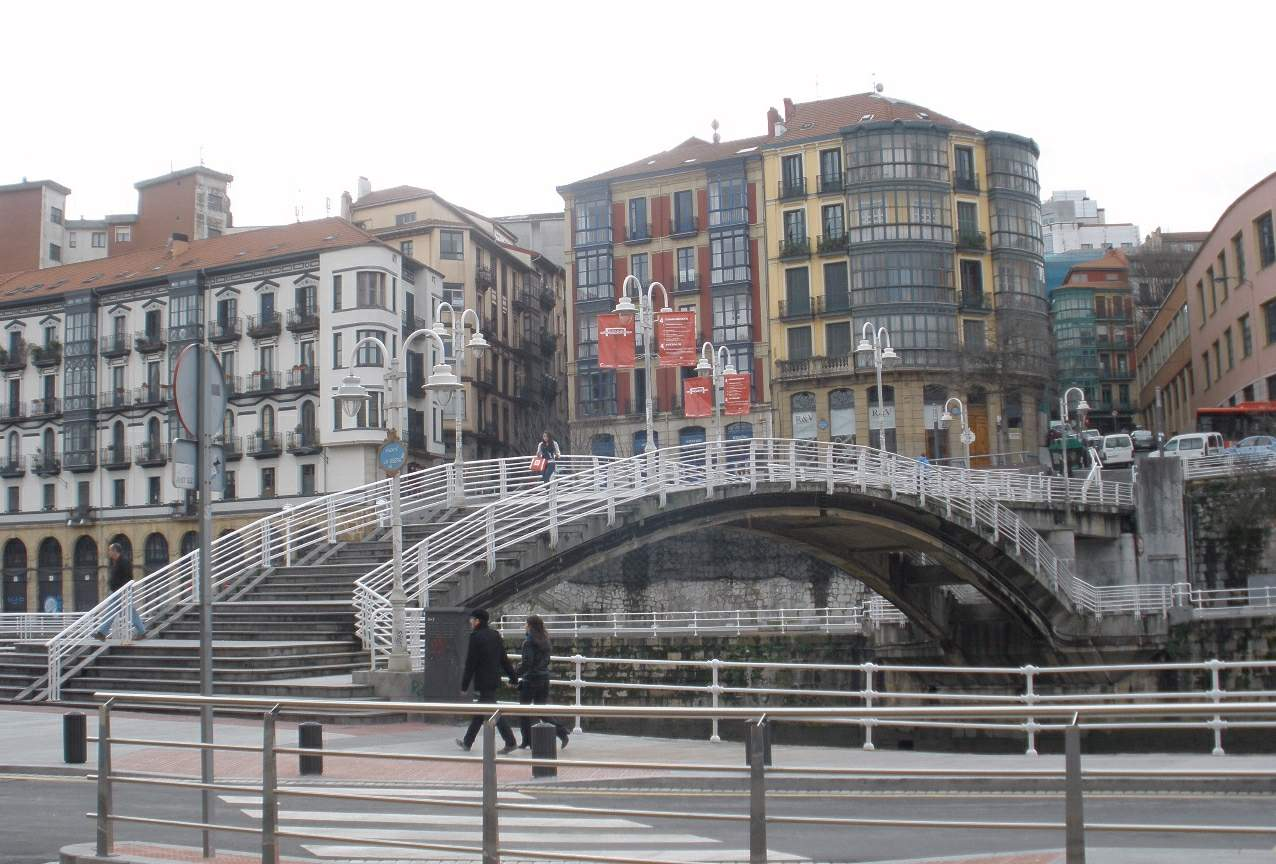 Bilbao - Puente de la Ribera